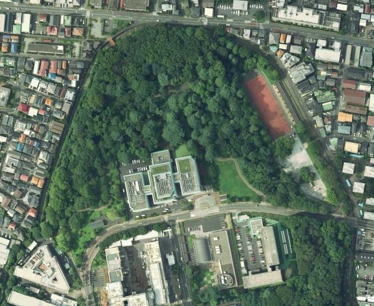 中野区立江古田の森公園を上空から撮影。国土地理院の地図・空中写真閲覧サービスからダウンロードした写真CKT20176-C21-14を回転およびトリミング。